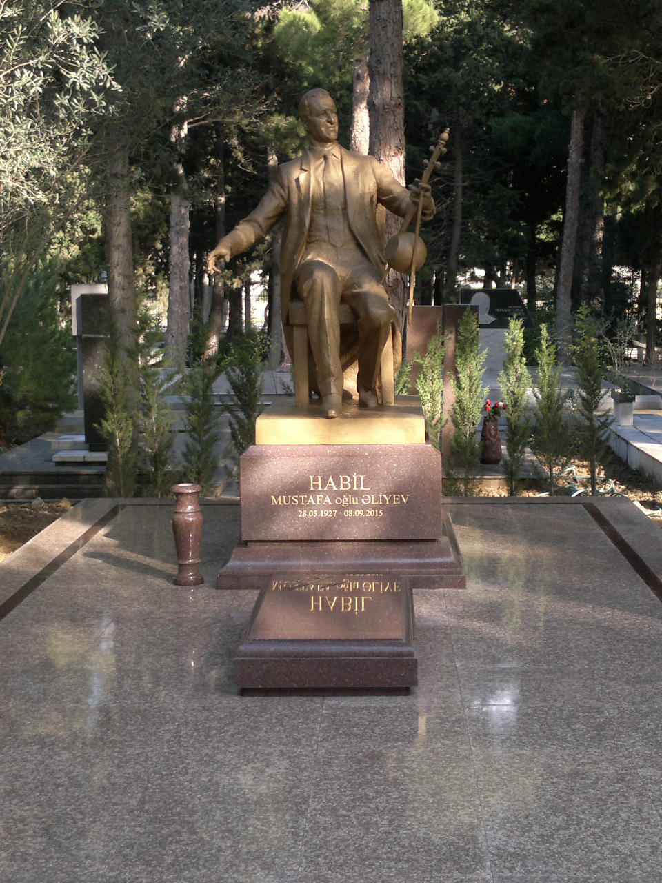 Habil Əliyevin Fəxri Xiyabandakı məzarüstü abidəsi